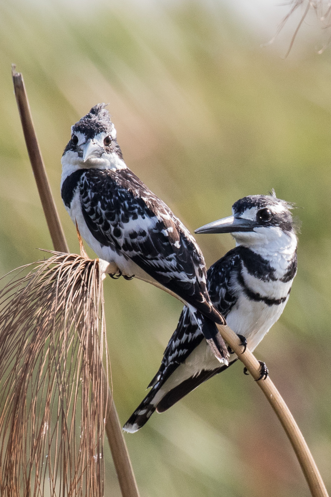 Der männliche Graufischer ist erkennbar an dem dünnen Querstreifen über der Brust.